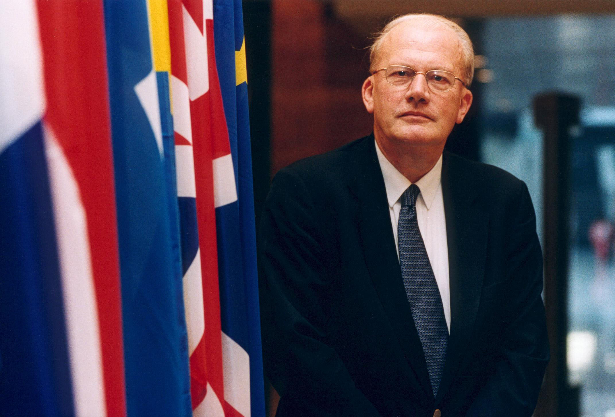 Nederlandse Europarlementariër Jan Mulder